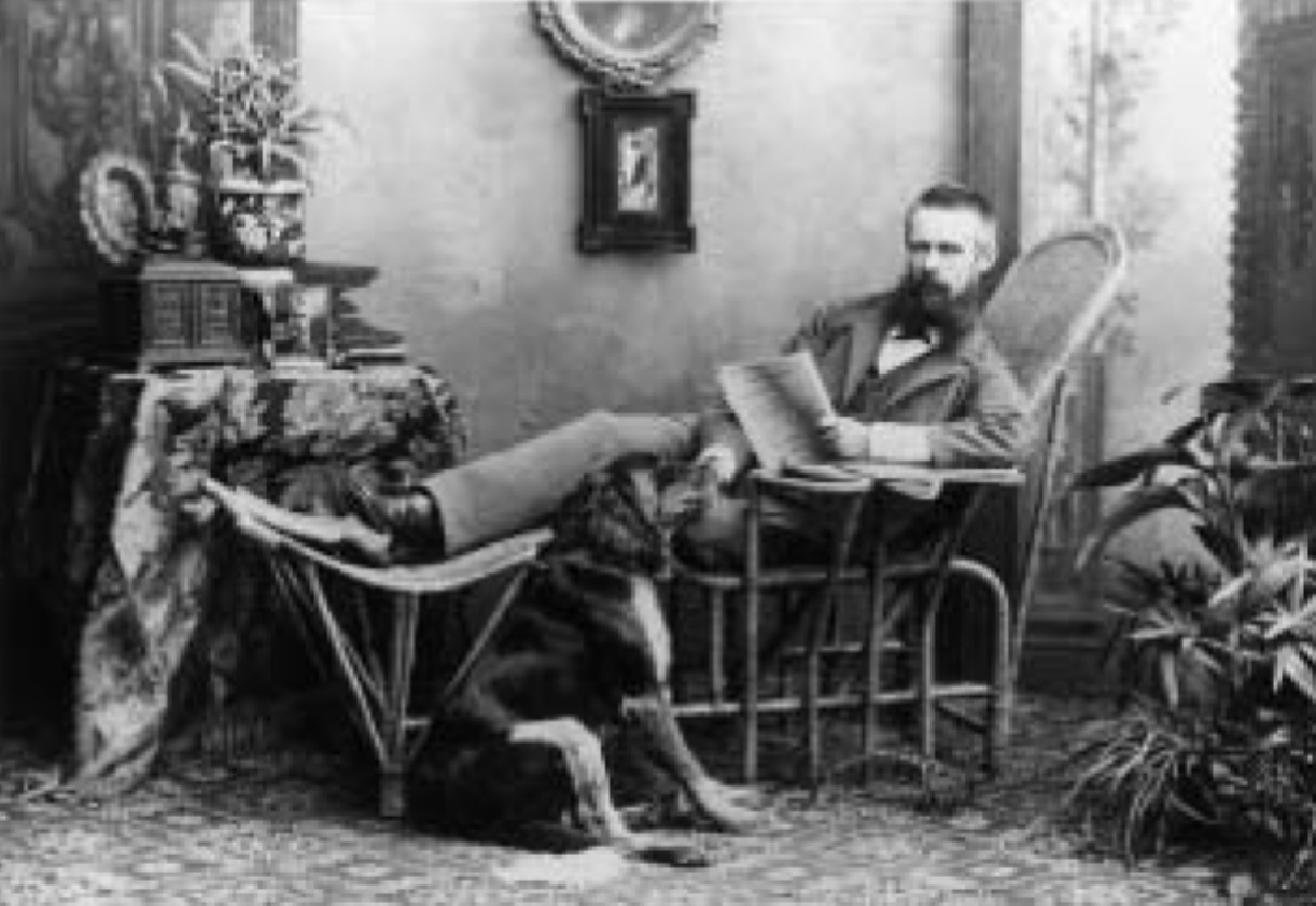 Franz Benque (1841-1921), German photographer